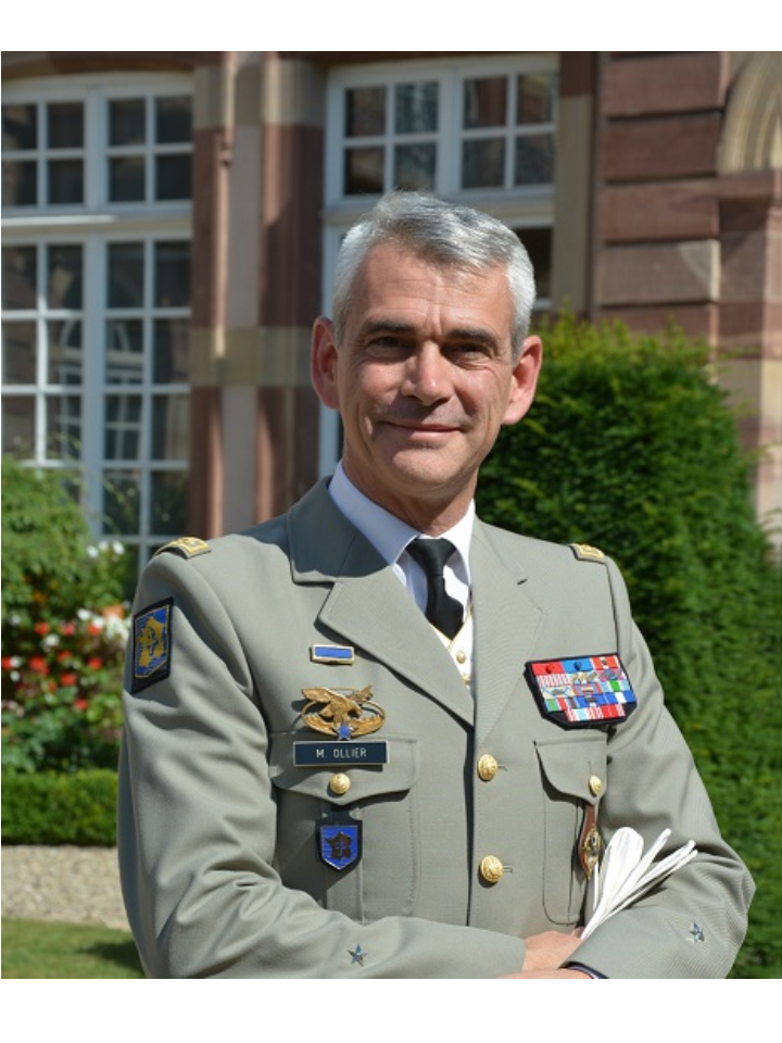 Le général Ollier, commandant de la 2e brigade blindée